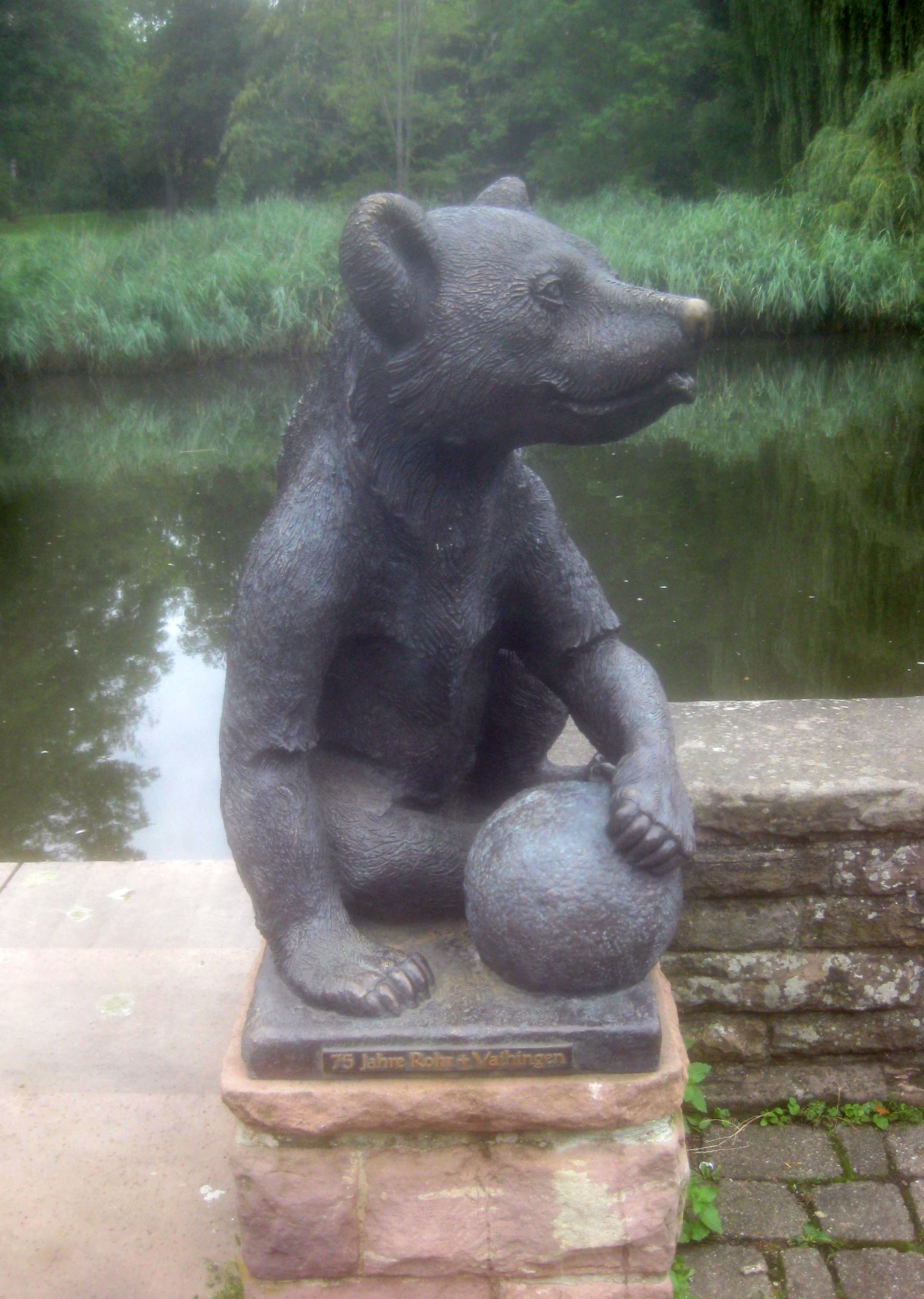 “Rohrer Bär“, kleine Bärenskulptur von Lilli Kerzinger-Werth, Sandstein, 1936, Bronzenachguss der Kunstgießerei Strassacker, 2011, Stuttgart-Rohr, Feuersee, Zugang bei Schönbuchstraße 14.